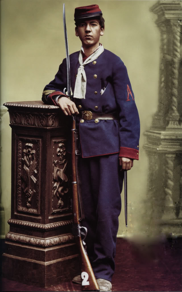 Sargento 1º M. Vergara del 2º Batallon del Regimiento Civico Movilizado "Aconcagua" segun o Sargento 1º César Polanco, 2do. Batallón del Regimento Cívico Movilizado "Aconcagua" con Comblain. Foto: Archivo Fotográfica Museo Histórico Militar de Chile. segun